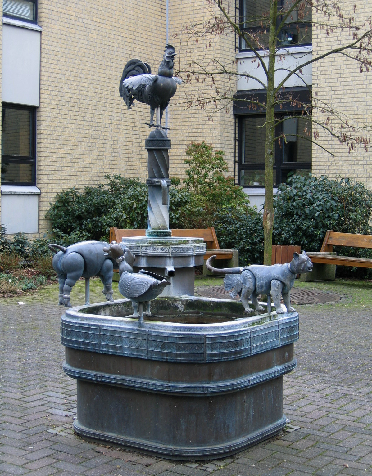 Bronzebrunnen „Die Bremer Stadtmusikanten“ vor dem Rathaus in Bremen (Ense), Gemeinde Ense.